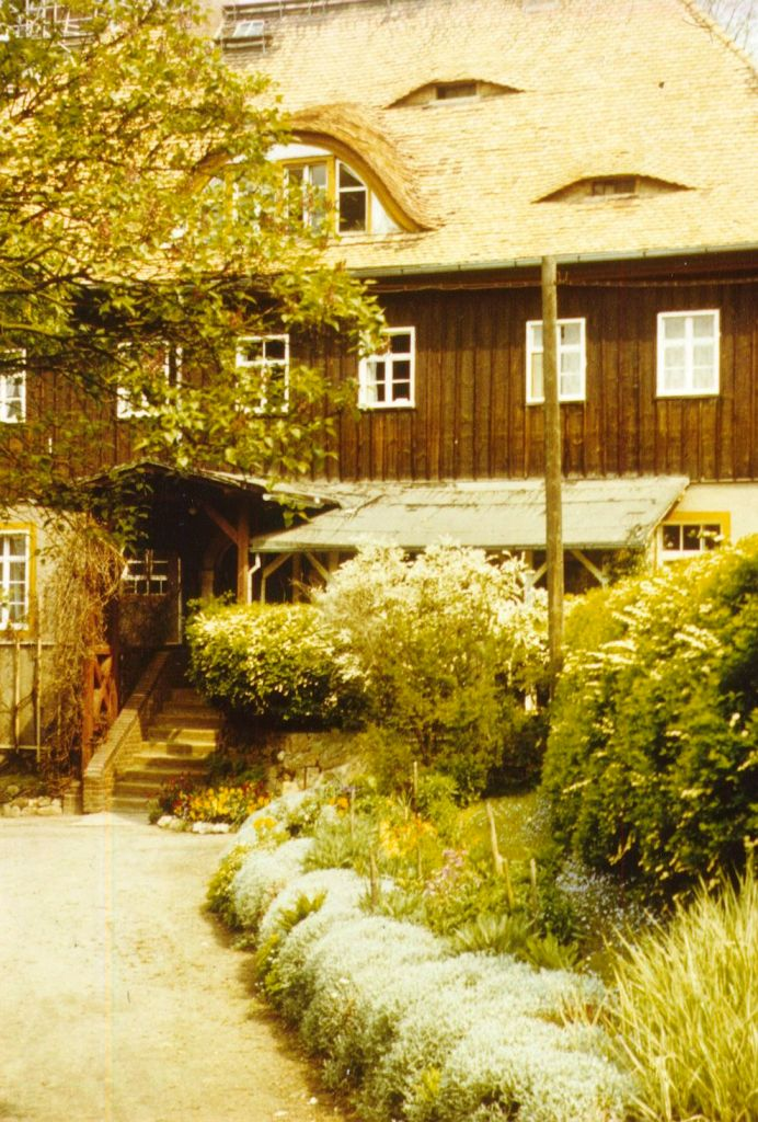 Pfarrhaus in Ebersbach/Sachsen